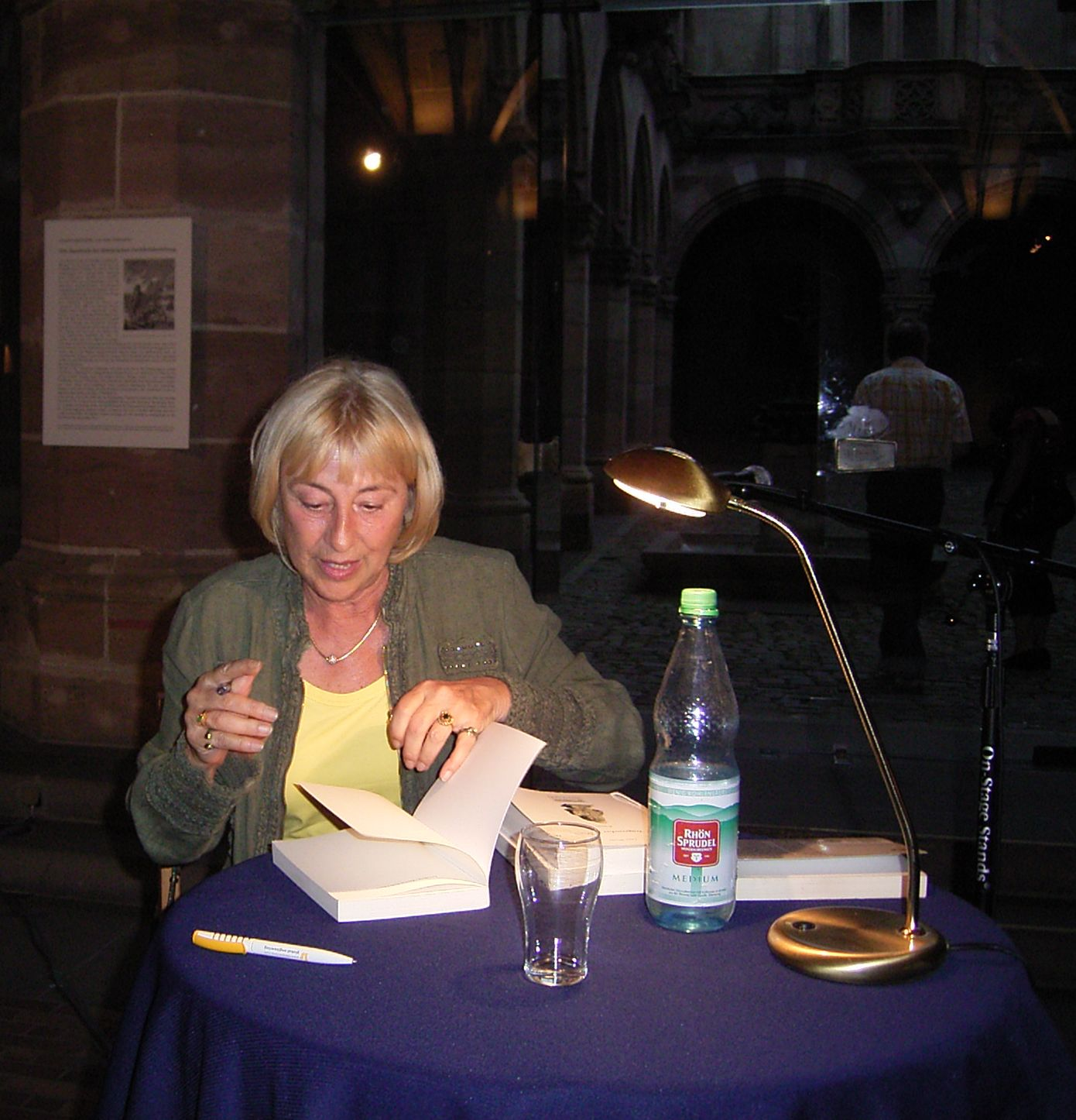 Autorin Lena Blom / Ottilie Arndt signiert Ihre Bücher bei einer Lesung in Nürnberg Pellerhof